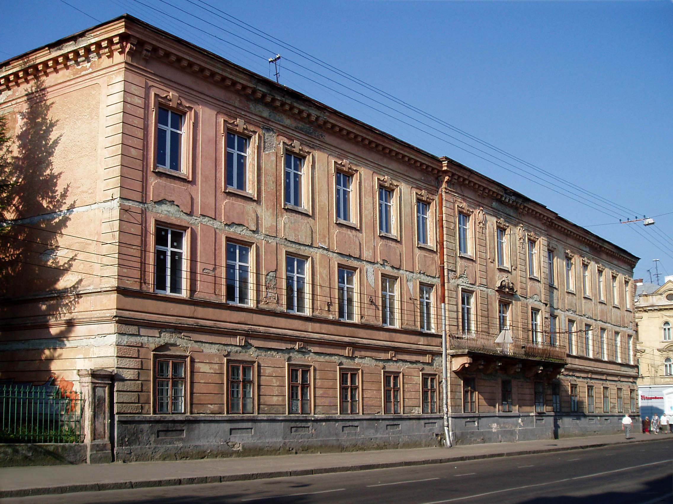 Будинок № 8-10 на вулиці Зеленій у Львові. Збудований 1871 року за проектом Йозефа Енґеля (1819—1888).